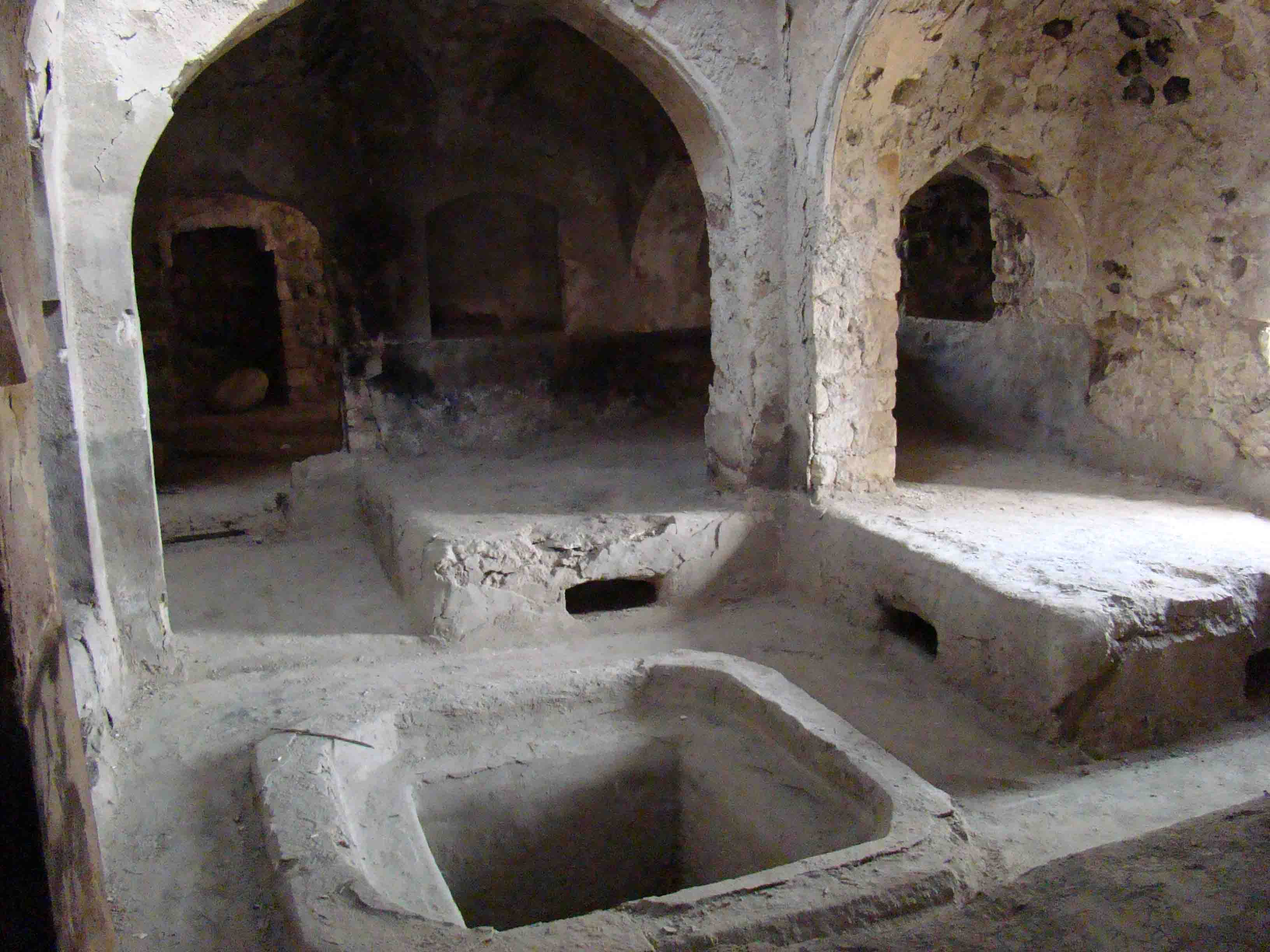 حمام خضر جويم نمای داخلی